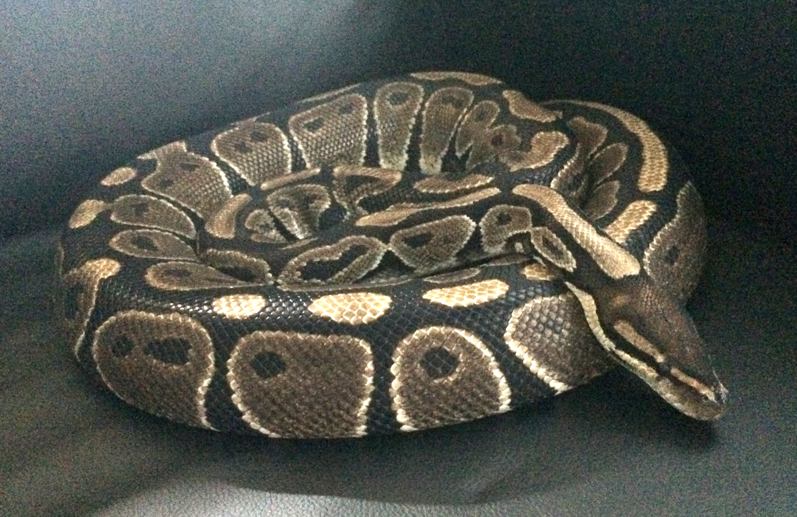 En normal Konge python, eller "Wild Catch"